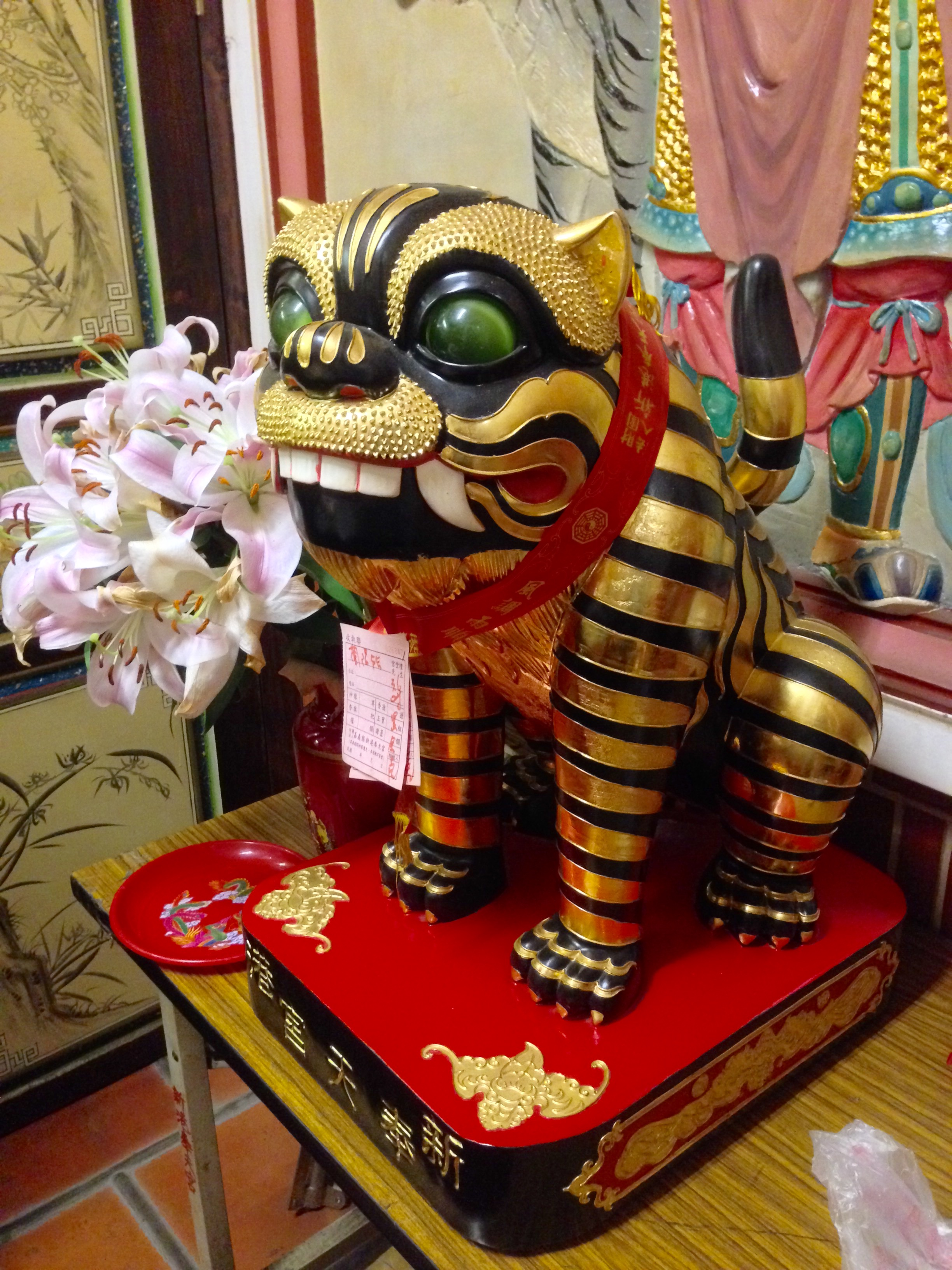 中文（台灣）: 新港奉天宮金虎爺